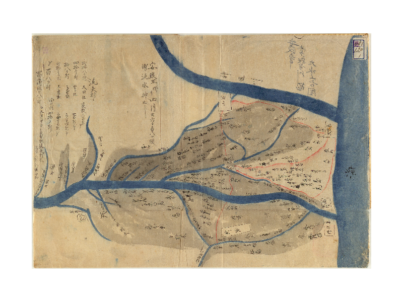 安政5年飛越地震に伴う水害を、常願寺川流域の絵図によって示したもの。富山県立図書館古地図・貴重書ギャラリーより引用。